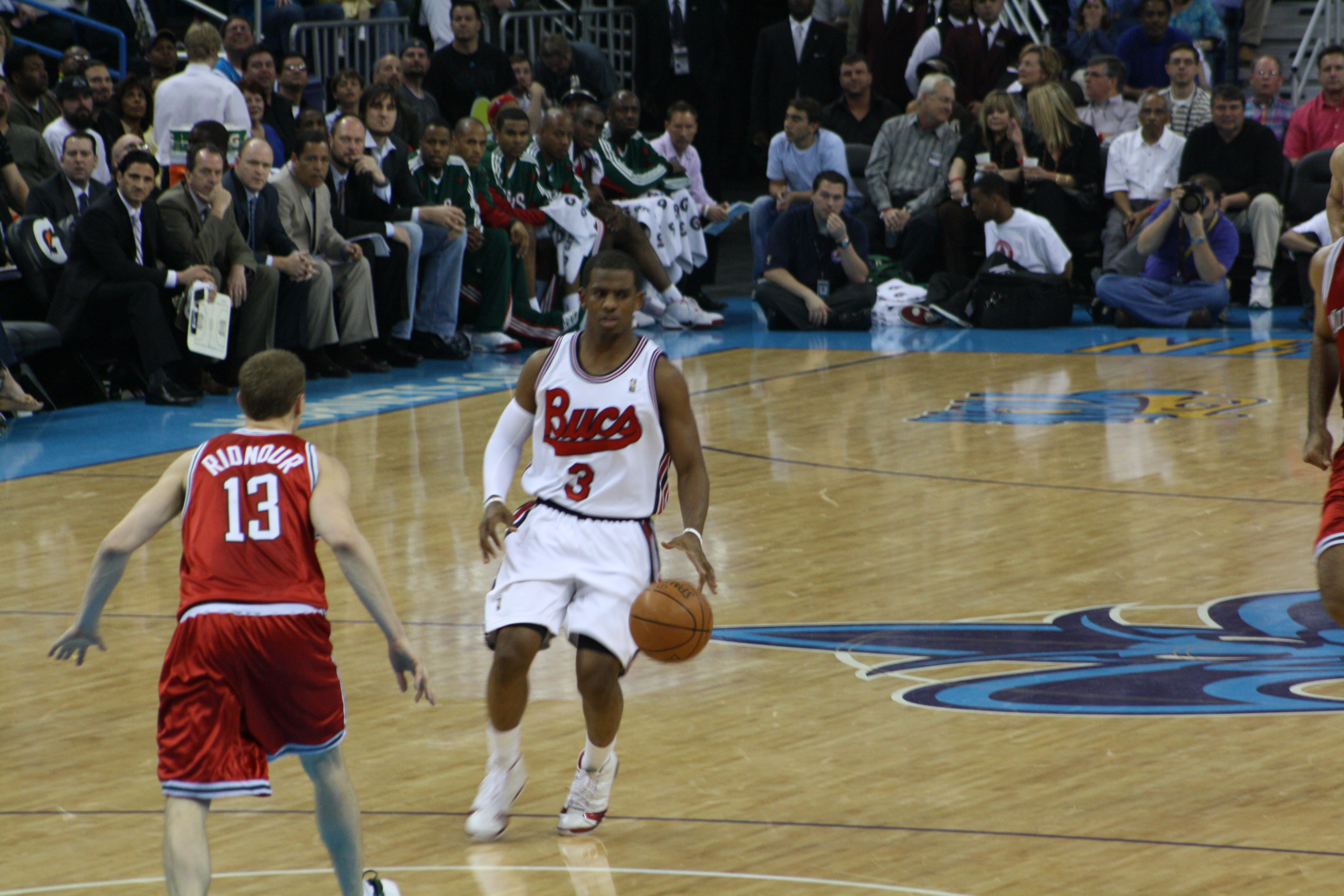 Paul defendido por Ridnour nun encontro fronte os Milwaukee Bucks.